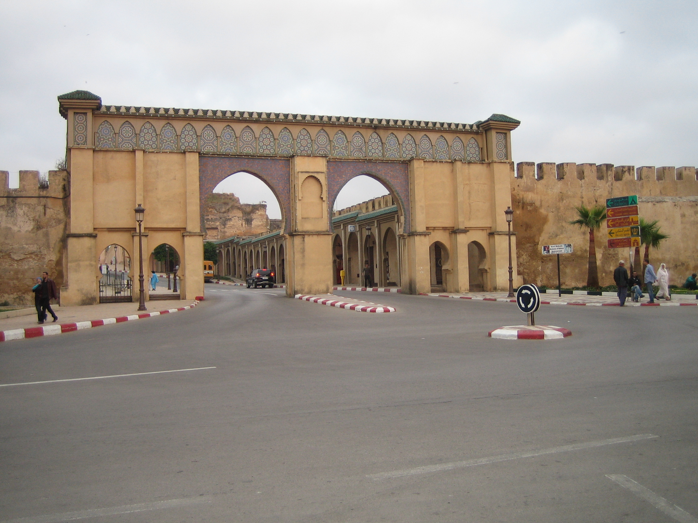 Bab Moulay Ismail à Meknès (Maroc)